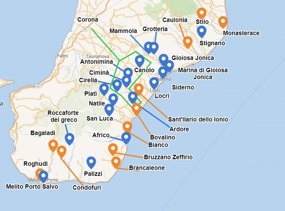 'ndrangheta nel mandamento ionico 2018